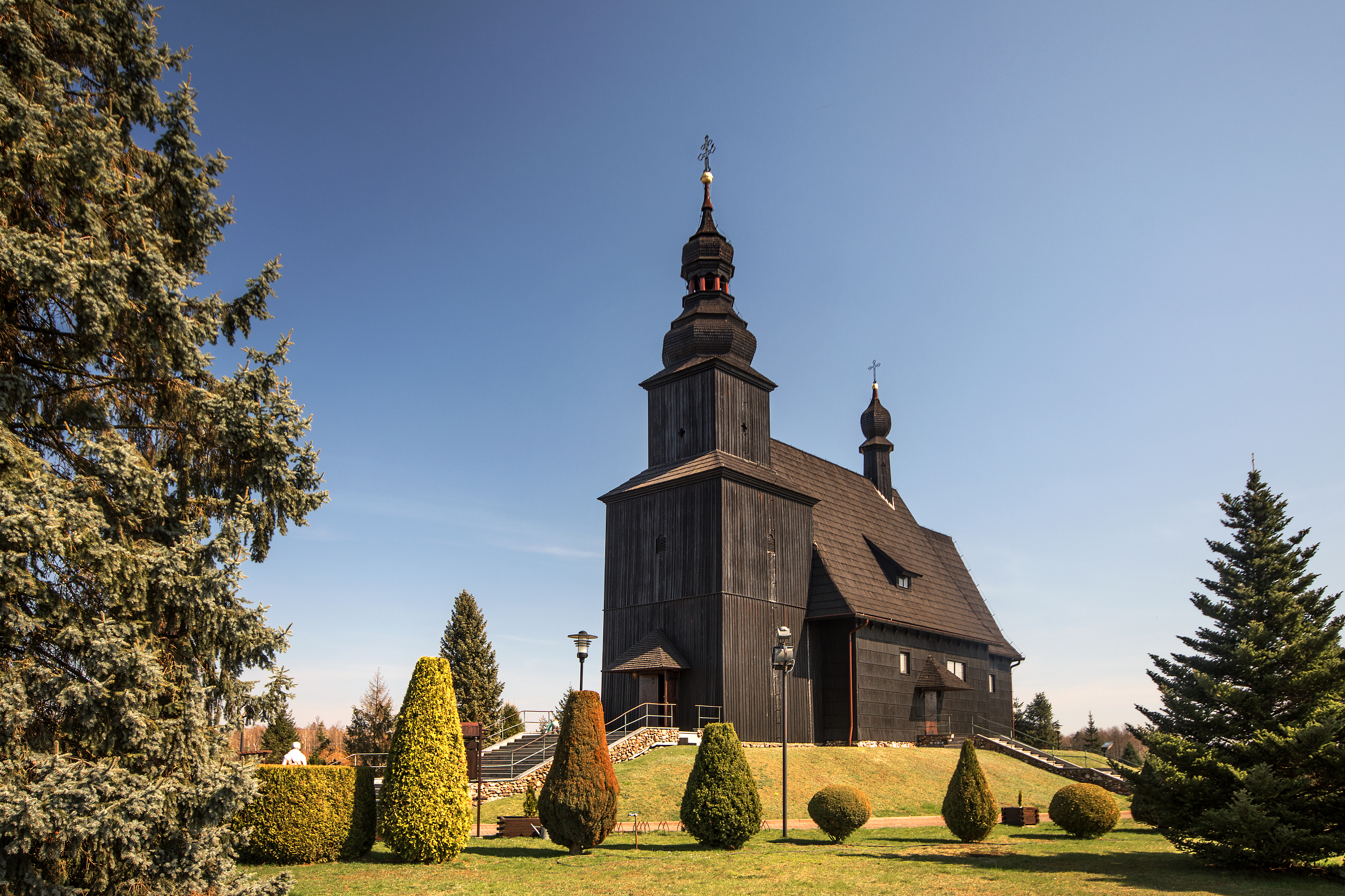 Gwoździany, kościół parafialny pw. Nawiedzenia NMP, 1756, 1977-1979